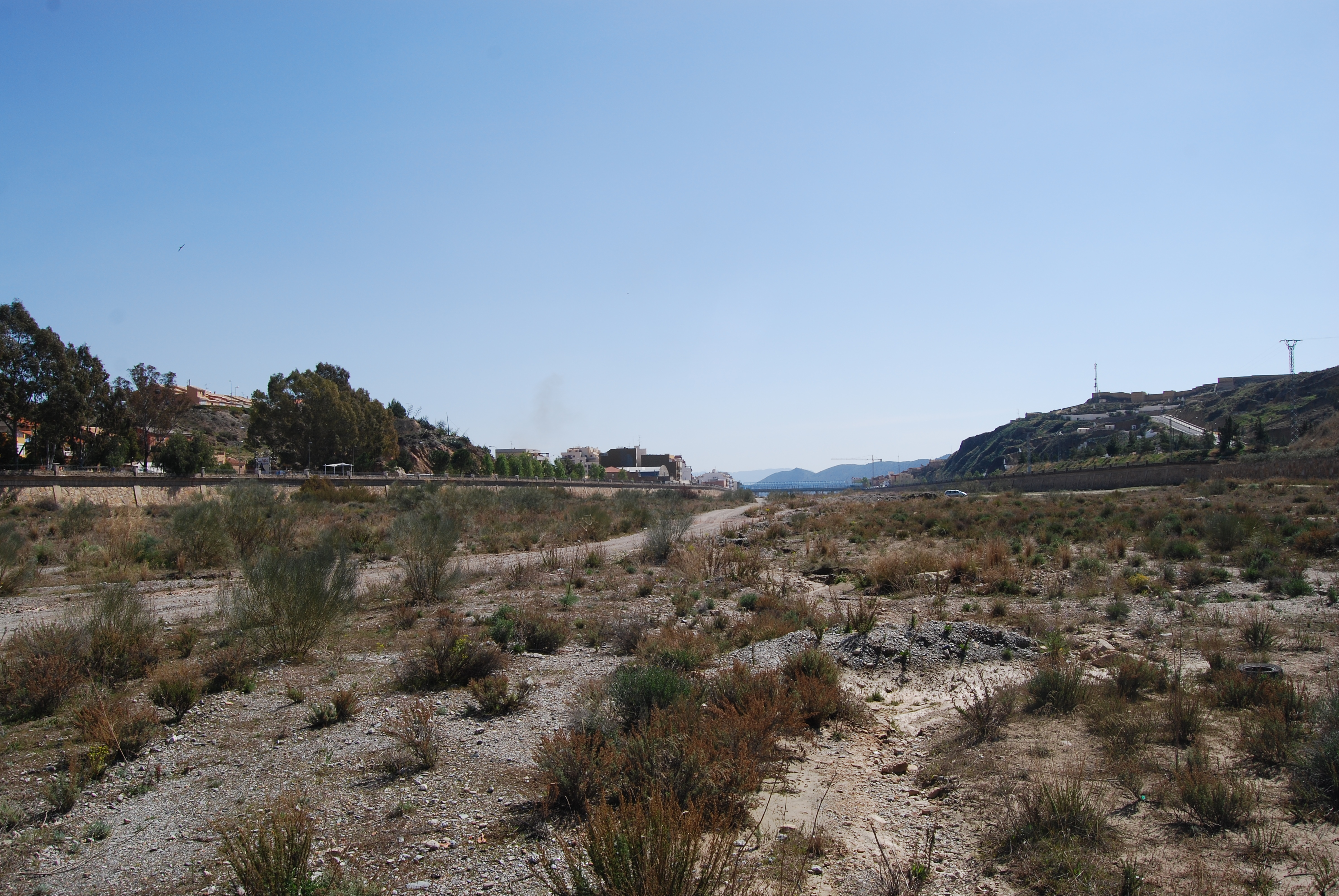 Cauce de la Rambla de Nogalte bajo el cual discurre una corriente de aguas subterráneas